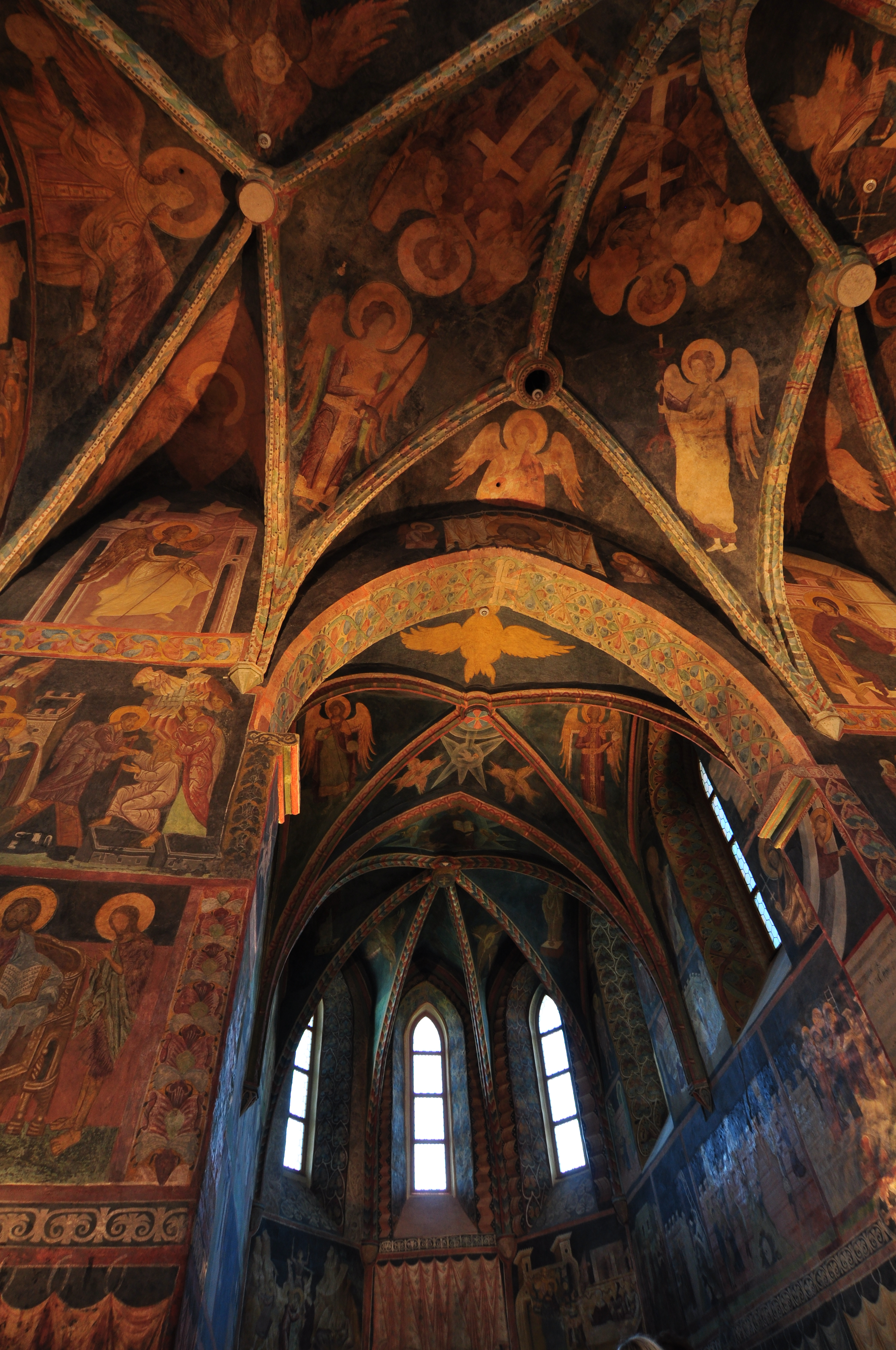 Lublin, kaplica p.w. Św. Trójcy, poł. XIV, XV, XVII